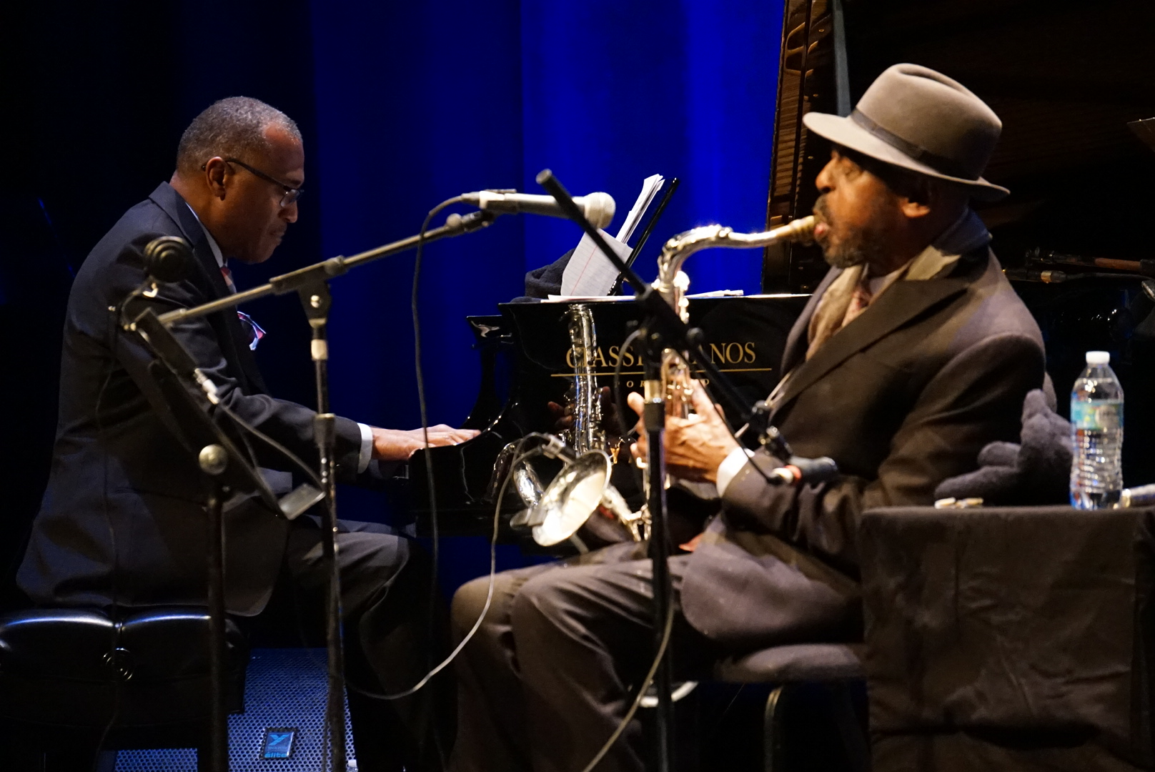 Lafayette Harris Jr Archie Shepp PDX Jazz fes 2020